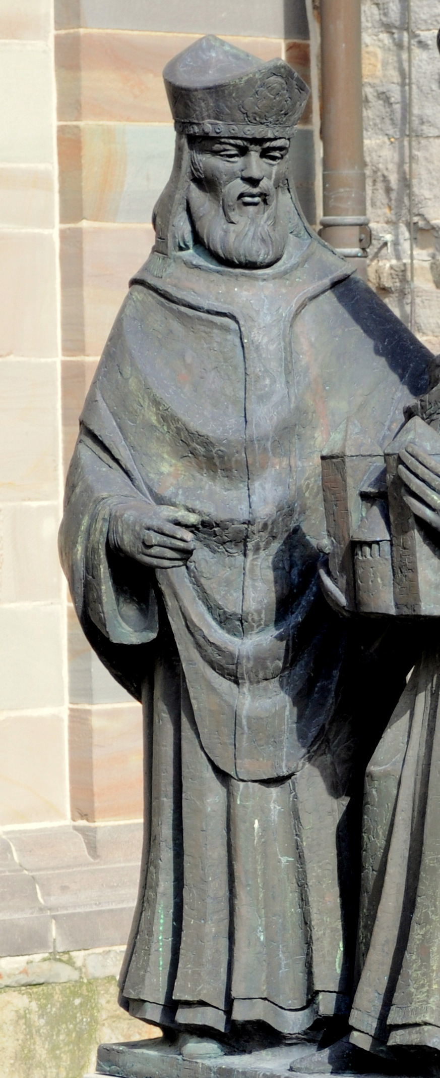 Saint Monulphe à la Basilique Saint-Servais